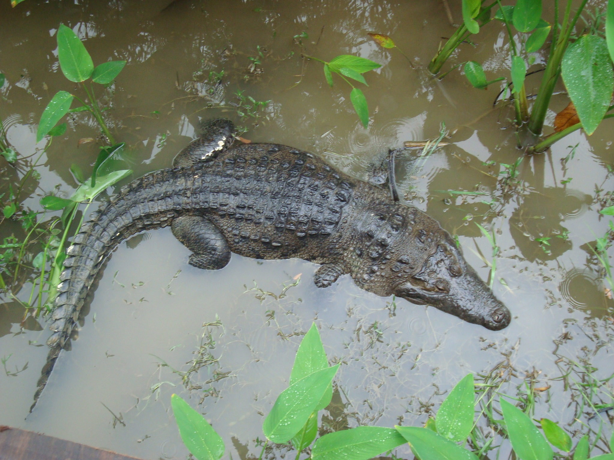 Cocodrilo Moreletii, conocido como Cocodrilo de pantano, en la Reserva de la Biosfera "Pantanos de Centla", municipio de Centla, Tabasco, México.